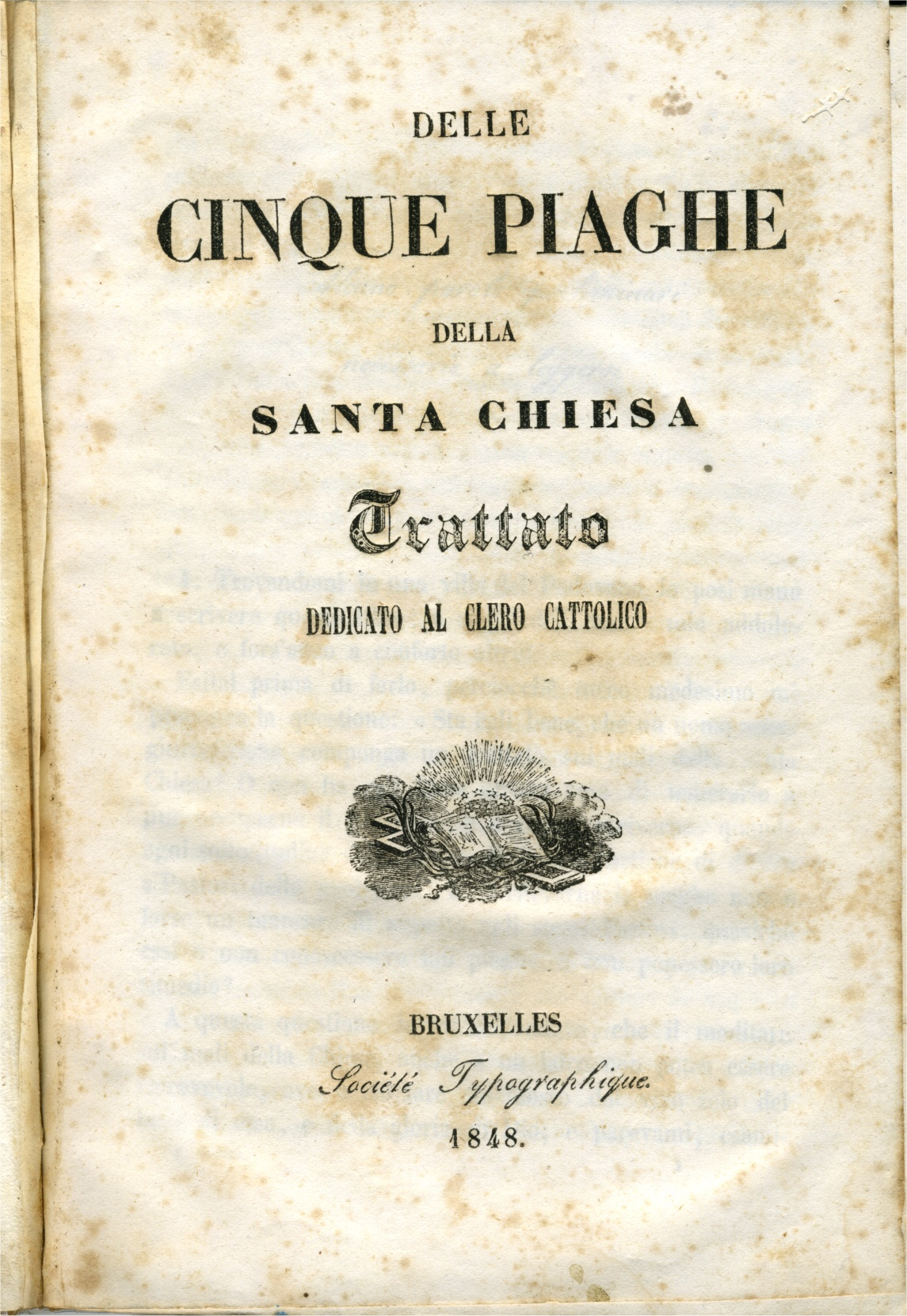 Frontespizio dell'opera di anonimo (ma Antonio Rosmini): Delle cinque piaghe della santa chiesa nell'edizione di Bruxelles del 1848.